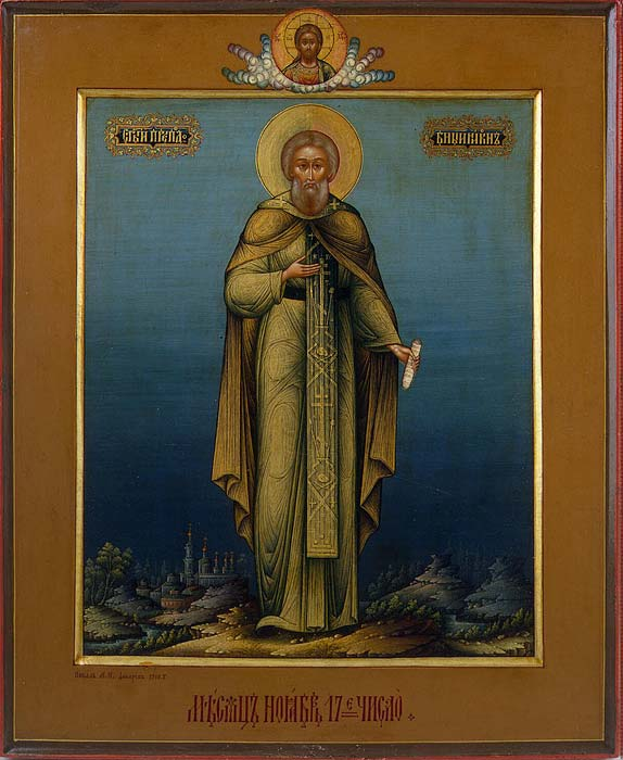 Преподобный Никон Радонежский. Икона месячной минеи. (Государственный Эрмитаж)